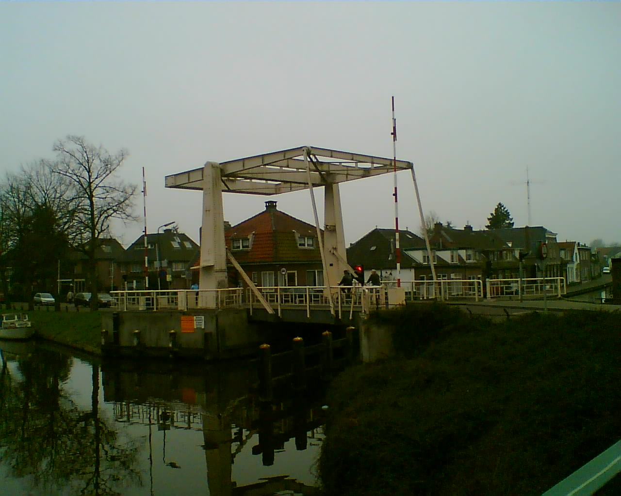 Rozenbrug, Woerden, Netherlands